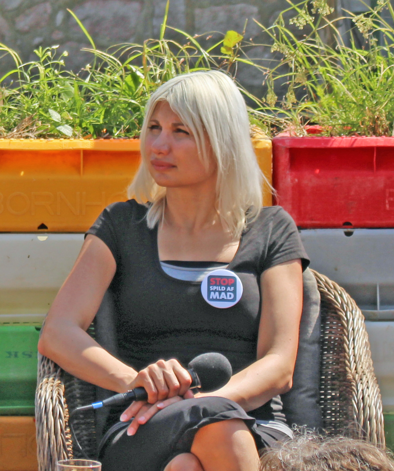 Informations arrangement med Selina Juul, Folkemødet 2015